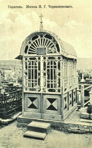 La vecchia tomba di Černyševskij a Satatov